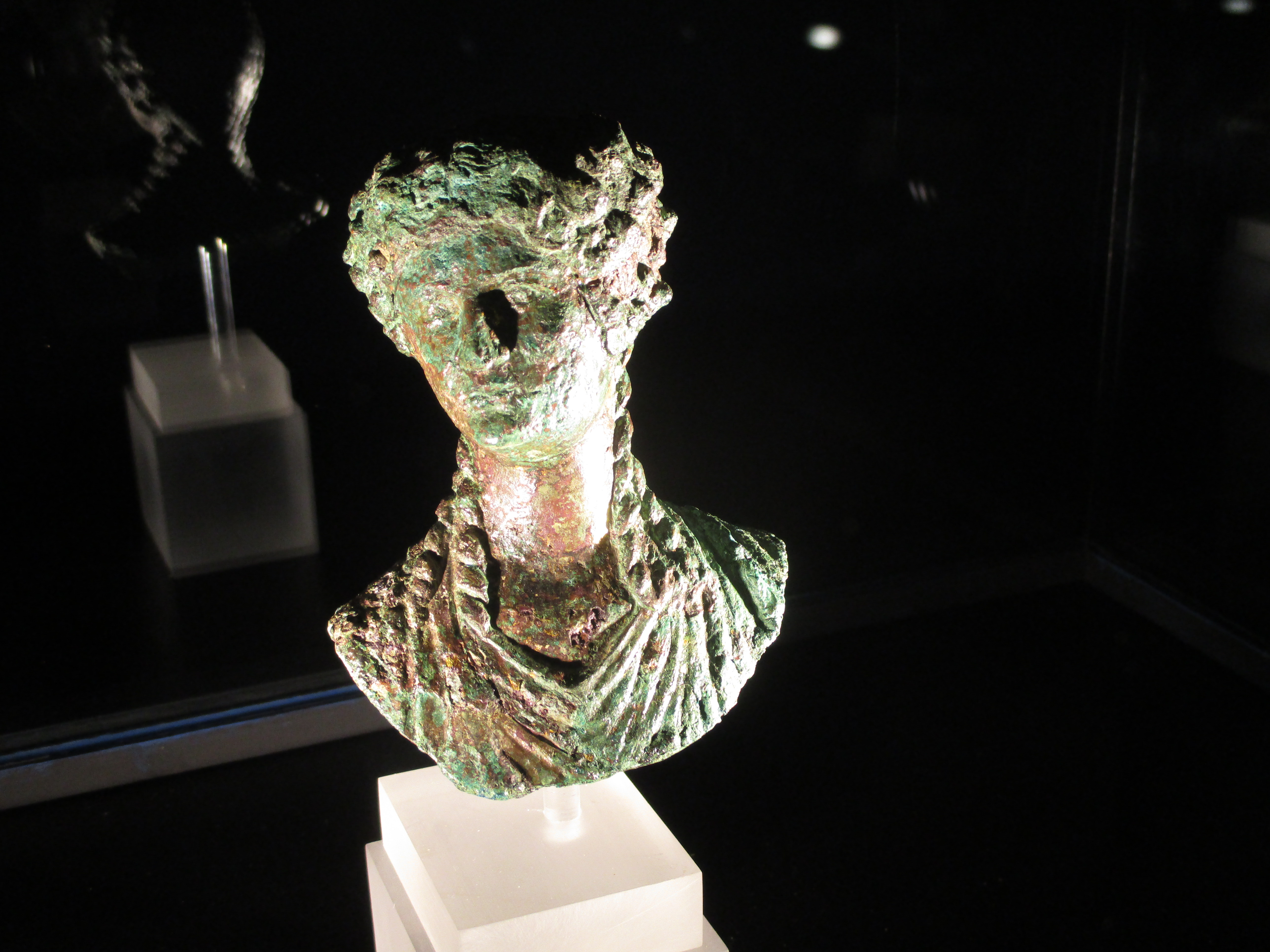 Busto di Agrippina Minore in bronzo dorato